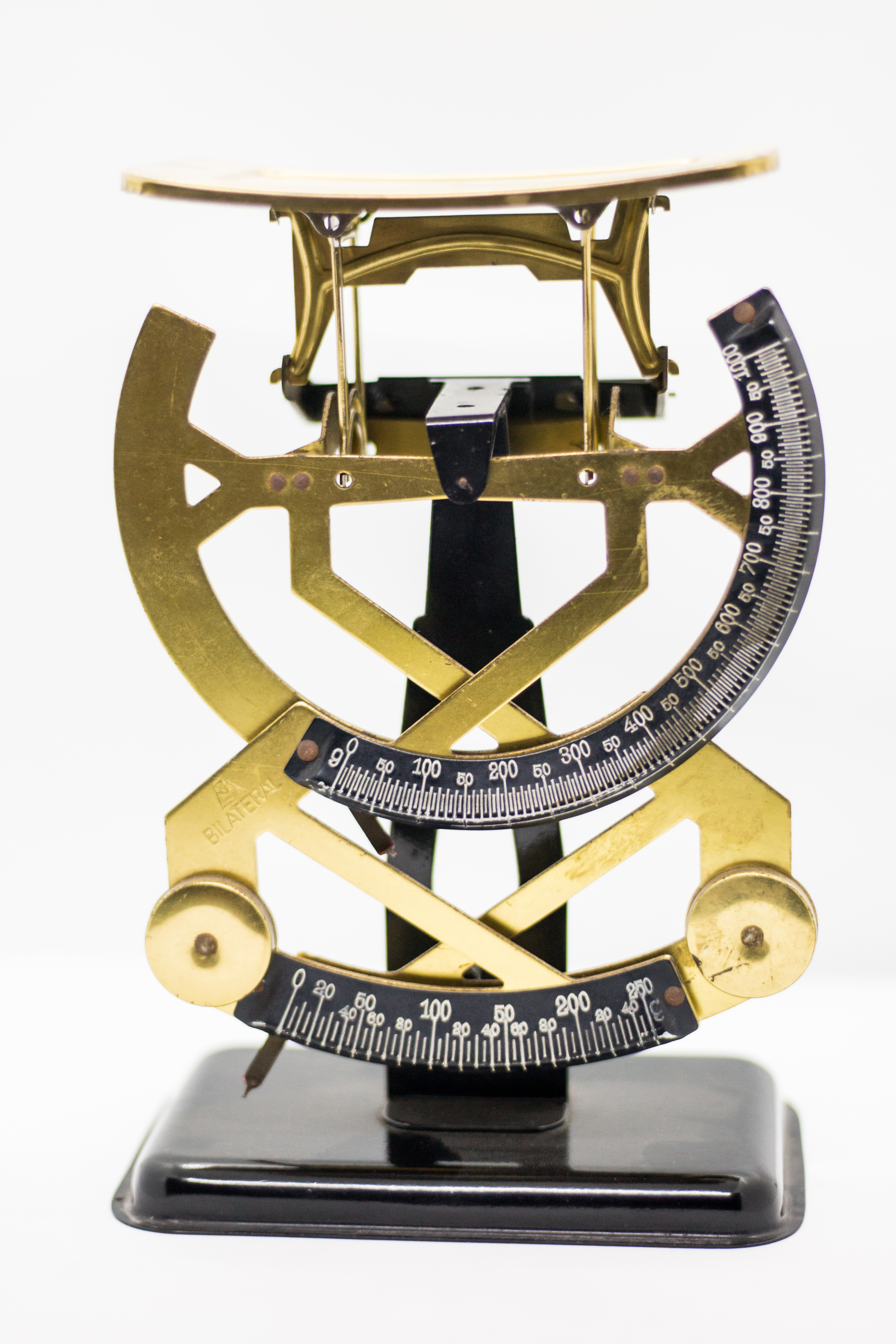 pèse-lettre, Fonds Léon Losseau, se trouvant à la Maison Léon Losseau à Mons